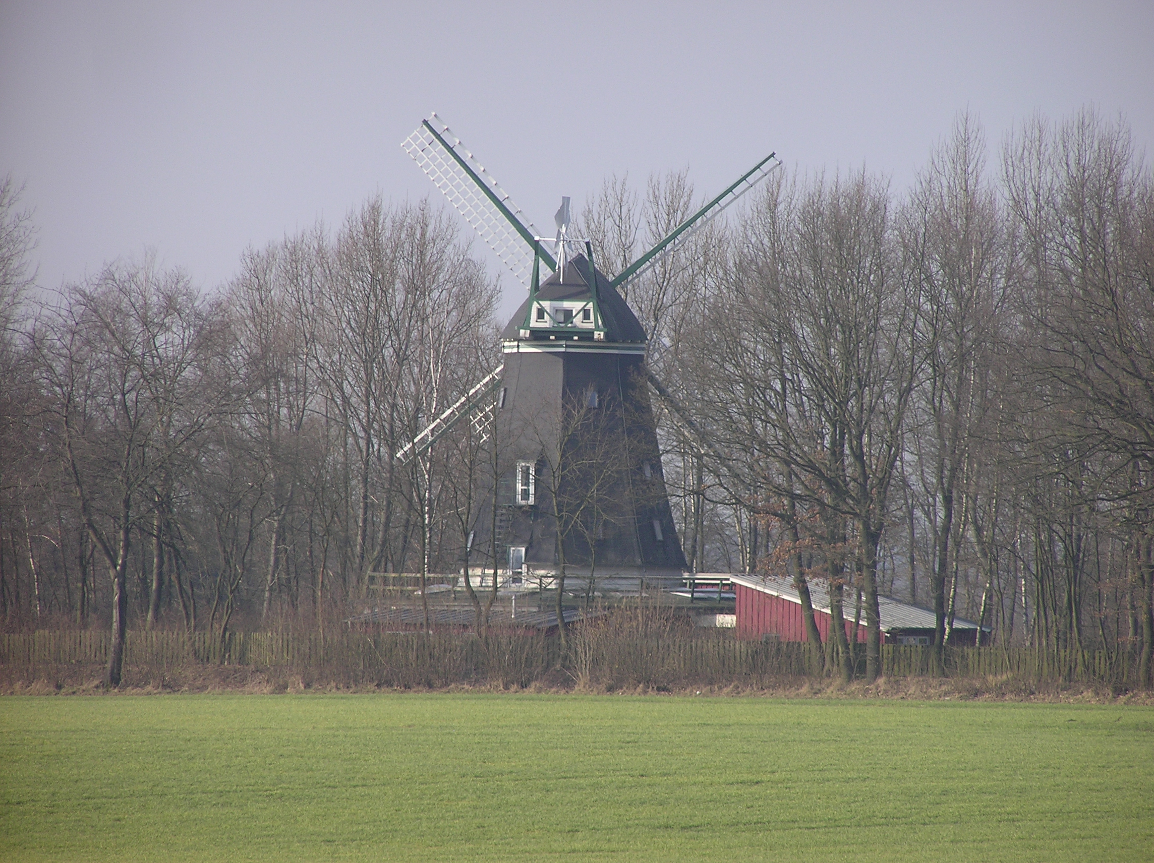 Windmühle in Fleischgaffel/Siek (Stormarn) nicht in Betrieb (Kappe festgesetzt).